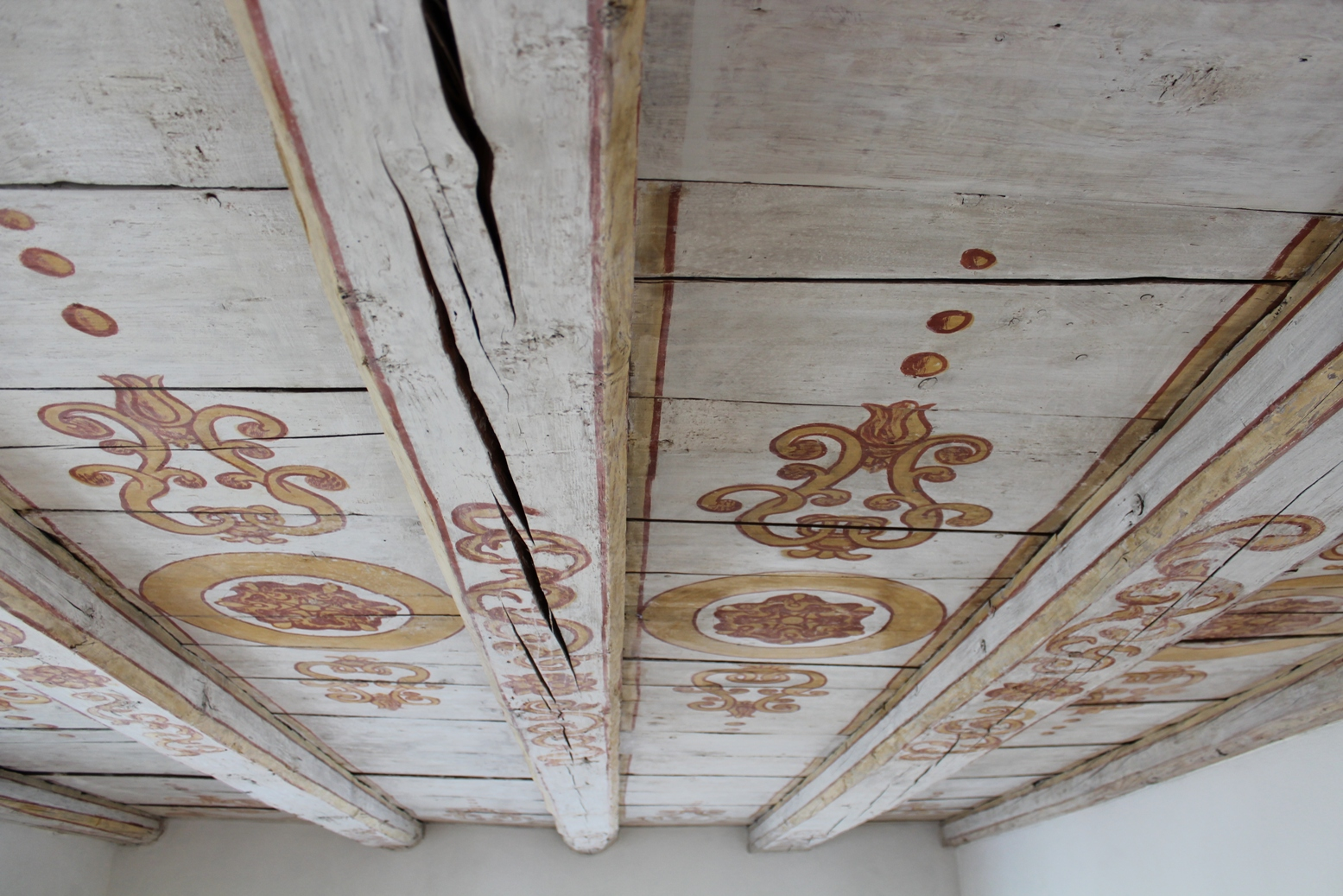 Denkmalgeschützte Decke